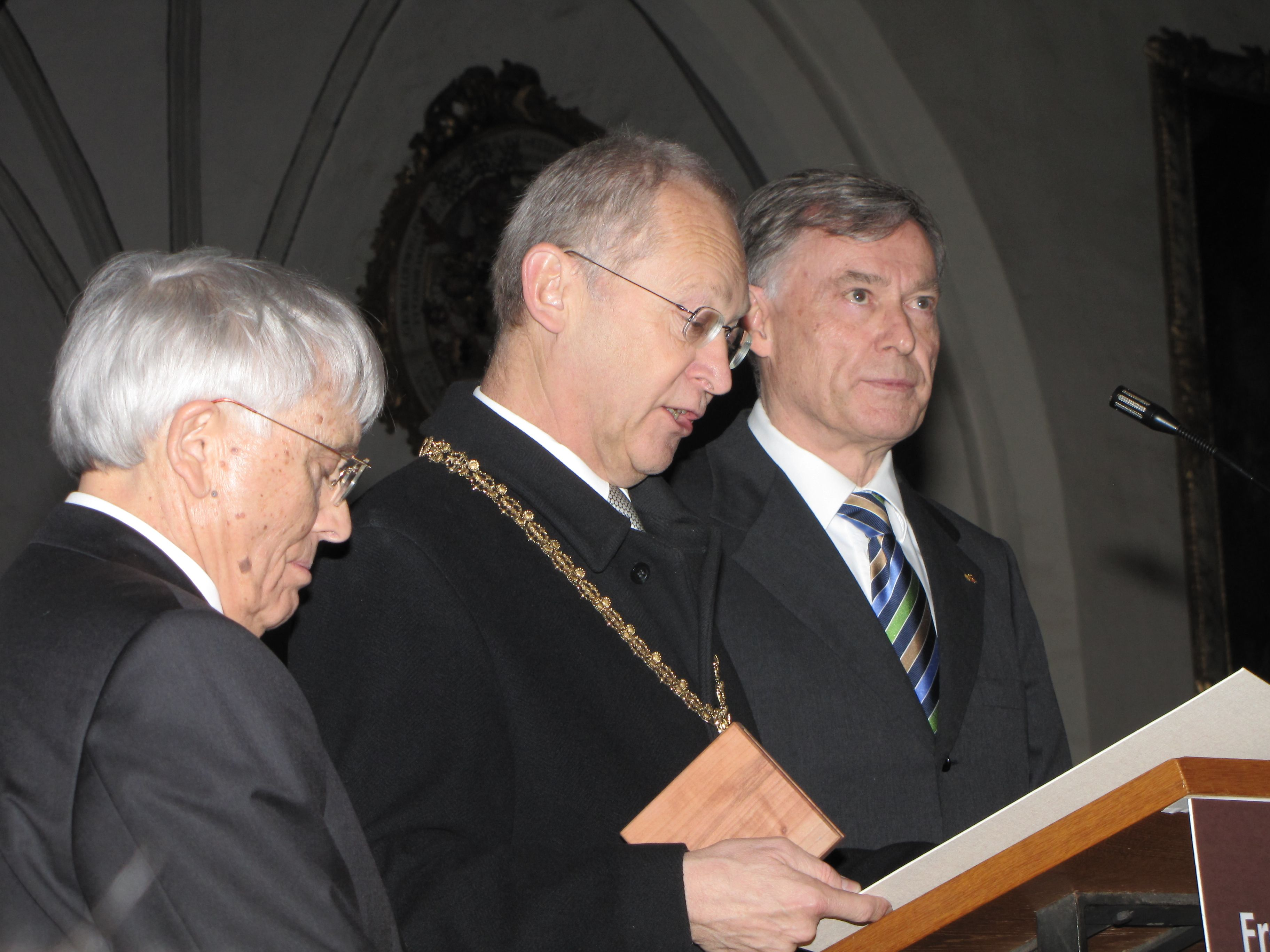 Übergabe des zweiten Memminger Freiheitspreises am 20.03.2009 in der Martinskirche zu Memmingen. Links ist Preisträger Reiner Kunze, in der Mitte Oberbürgermeister Dr. Ivo Holzinger und rechts Bundes